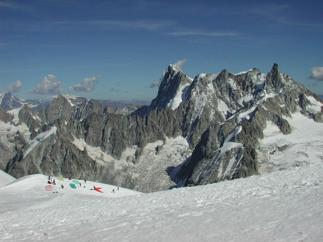 Vue vers le nord depuis l'arête NE de l'Aiguille du Midi. Parapentes au premier plan, les Grandes Jorasses en fond. View towards the north from AIguille du Midi. Photo R. Lacassin